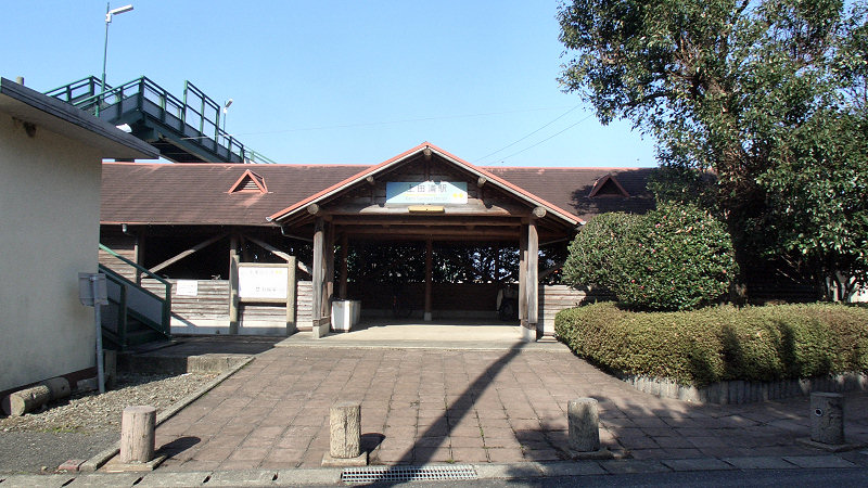 肥薩おれんじ鉄道線上田浦駅 駅舎風の駐輪場 駅前が狭く建物全体の撮影は出来ませんでした。 撮影者/著者/著作権保有者 : MK Products (本人がアップロード) 撮影日 : 2006/12/19 上田浦駅用にアップロードした画像です。良い画像があれば別の画像に変えてください。